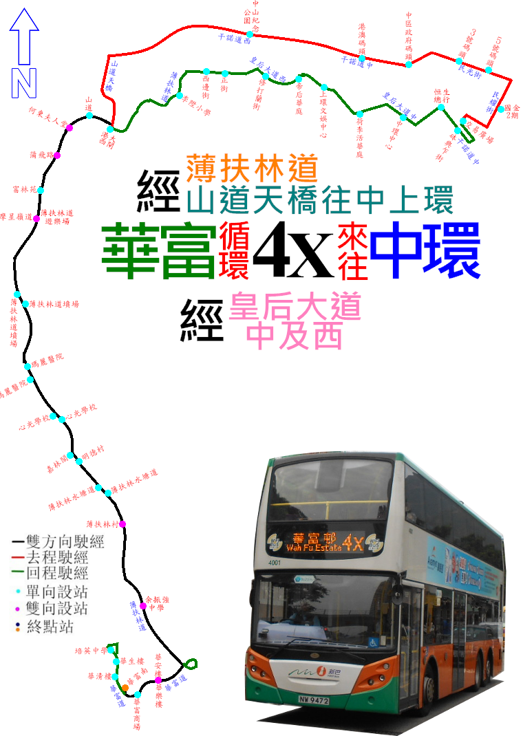 中文（香港）: 新巴4X線的走線圖